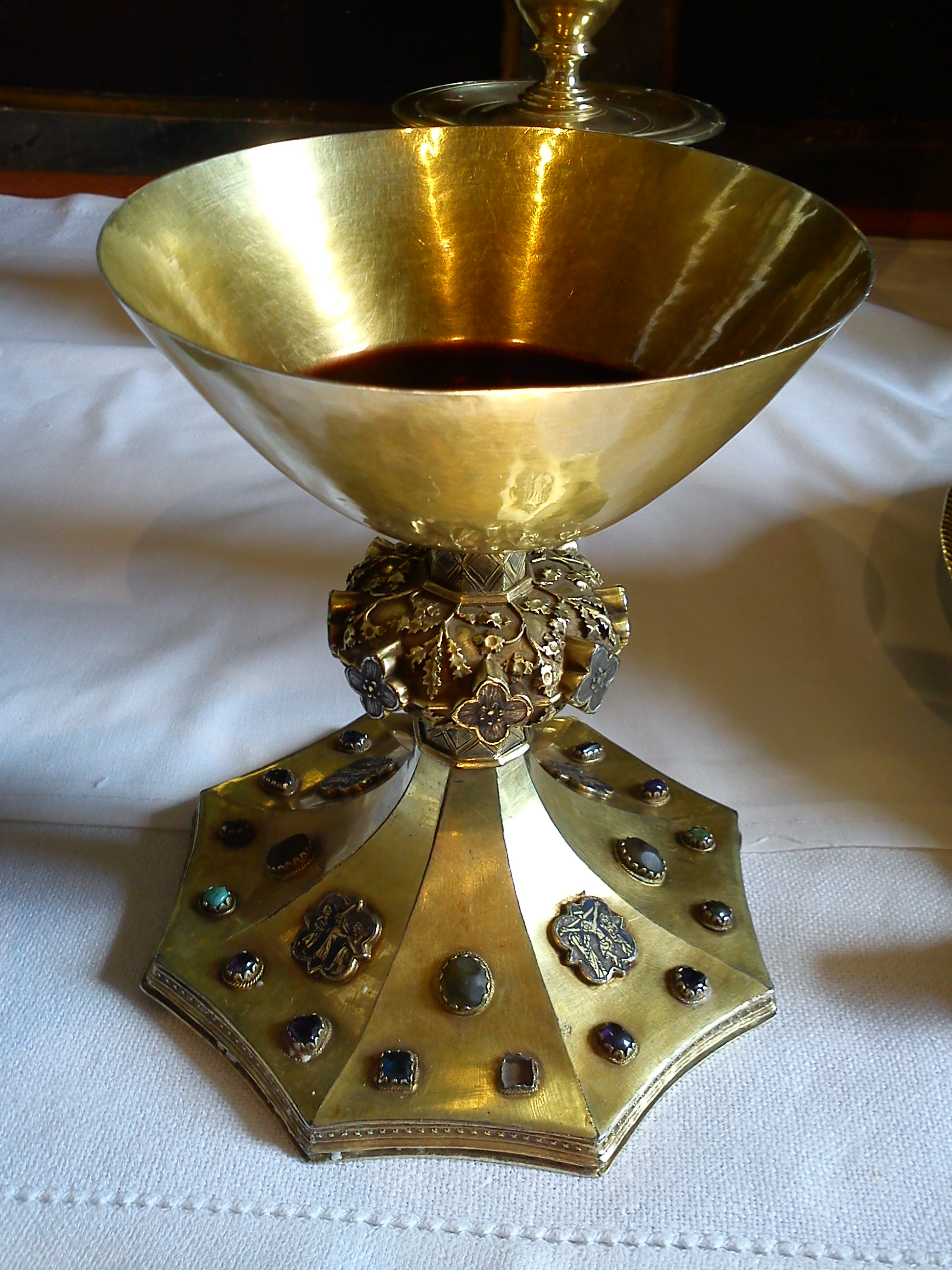 Den gamle alterkalken i Slidredomen, gitt til kirken i gave av Salomon Toraldsson som takk til Gud for at han overlevde Svartedauden